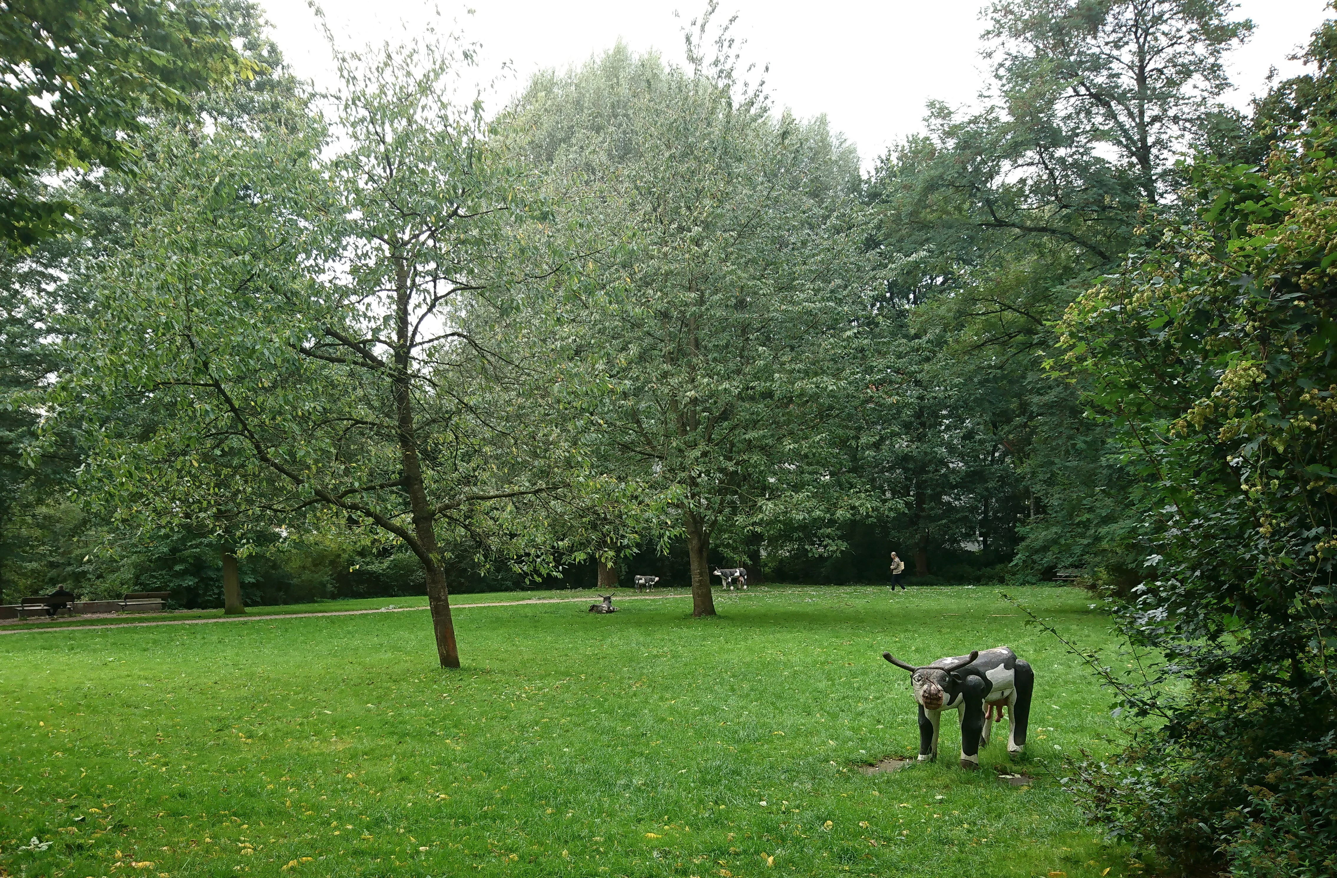 Franz-Röttel-Park an der Tangstedter Landstraße 15 mit Spielgerät-Holzsskulptur der SIK-Holzgestaltungs GmbH, "Franz-Röttel-Park", Hamburg-Langenhorn.